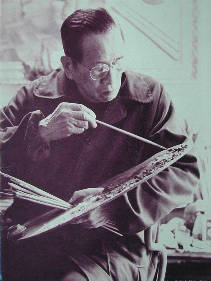 李梅樹晚年作畫的情景